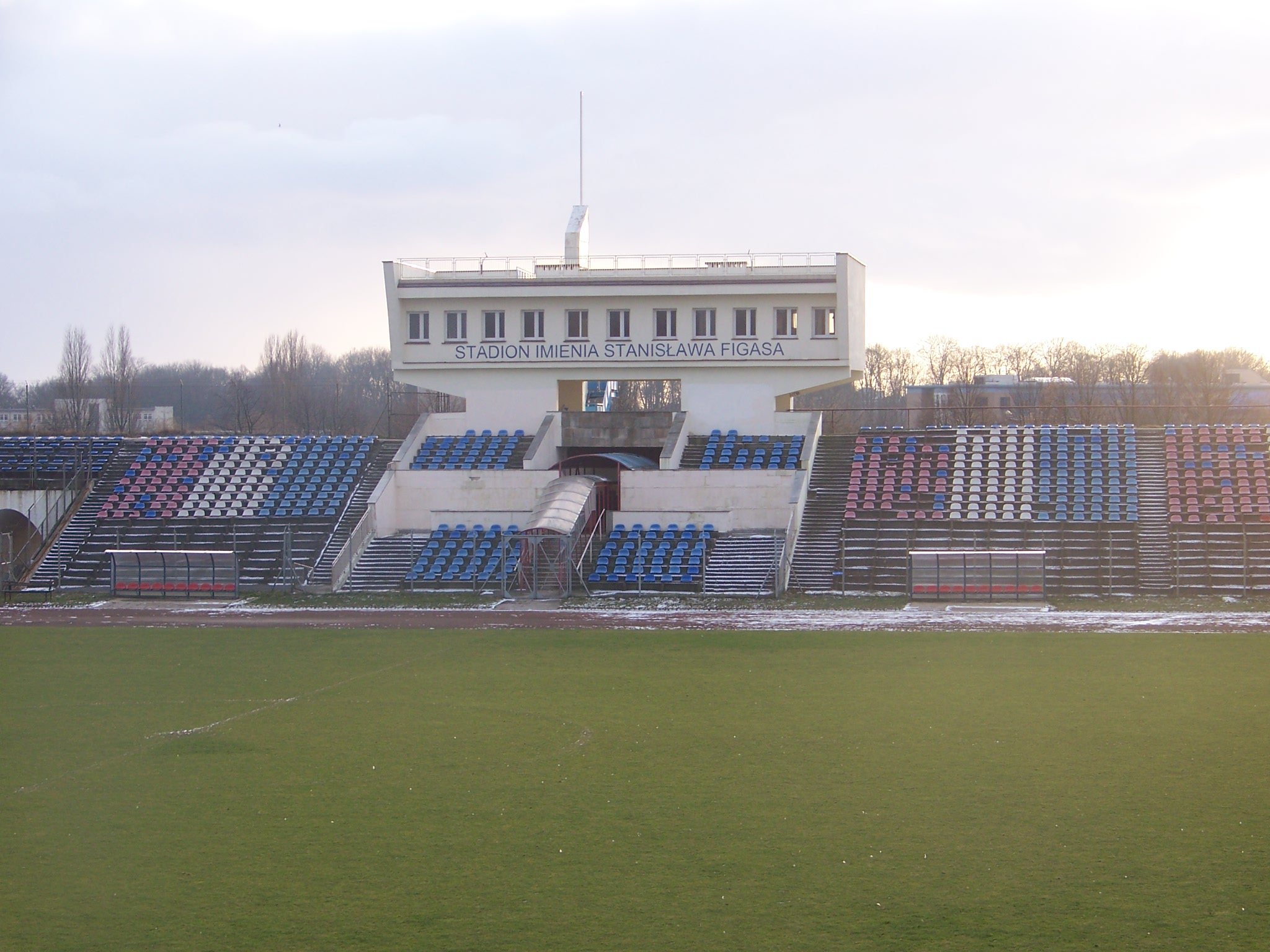 Stadion Gwardii Koszalin im Stanisława Figasa